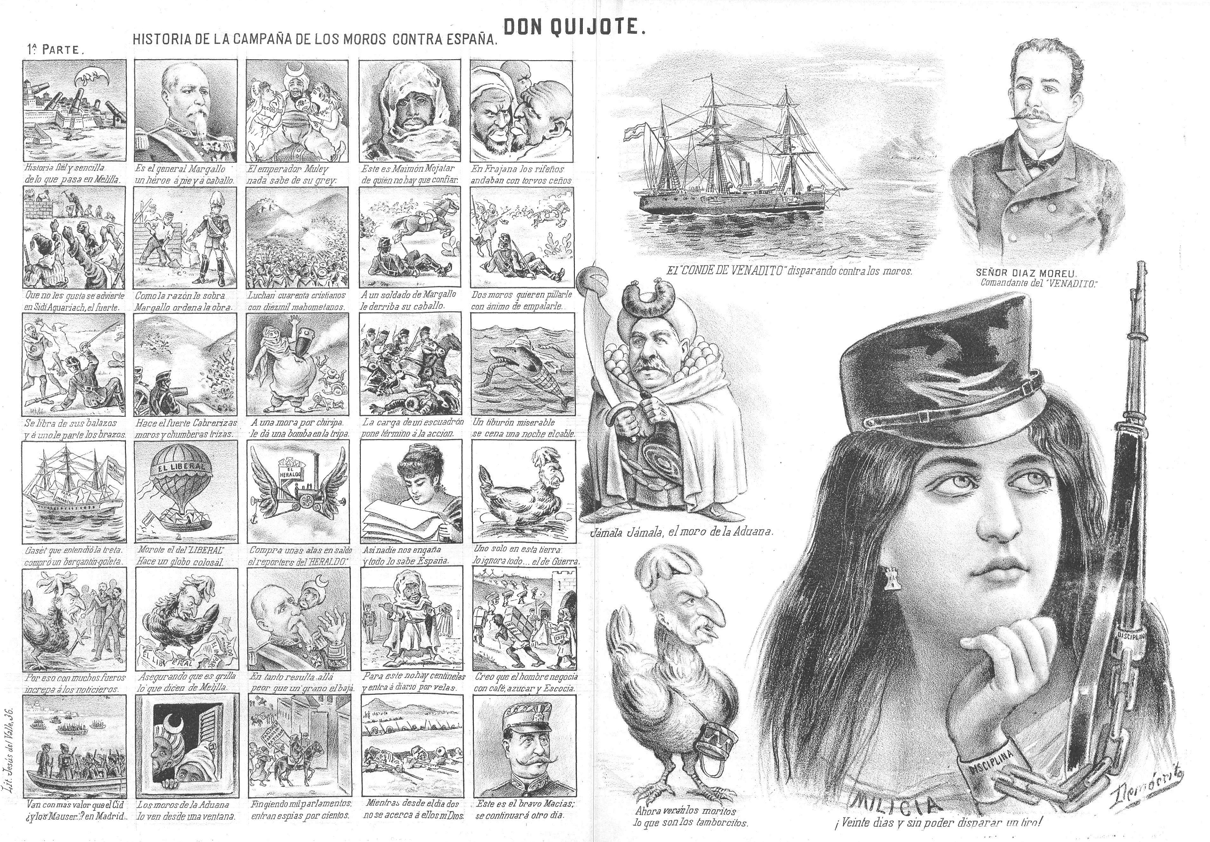 Ilustración de Eduardo Sojo «Demócrito, publicada en la revista satírica española Don Quijote.